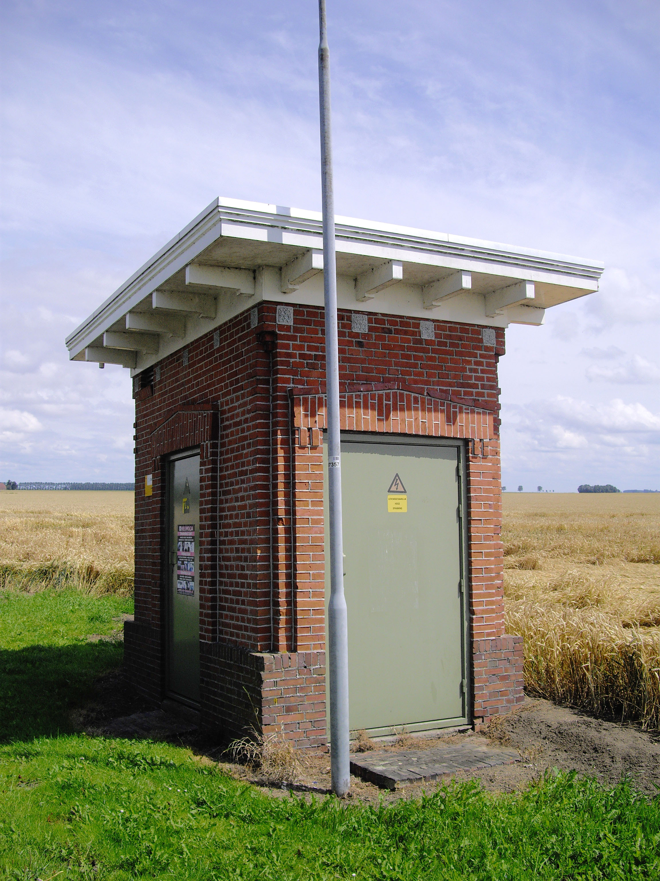 gefotografeerd tgv Heemschut-100 jaar